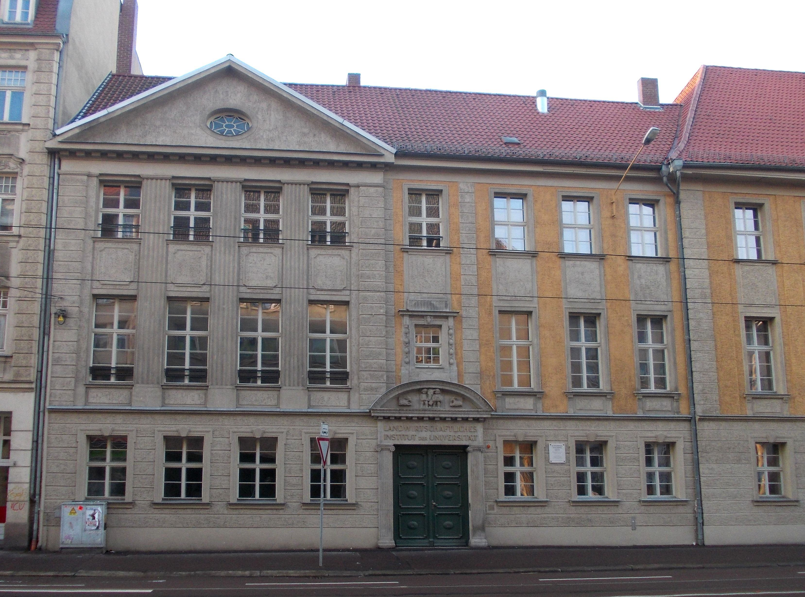 Ehemaliges Landwirtschaftliches Institut der Universität Halle (Saale), heute Teil des Steintor-Campus